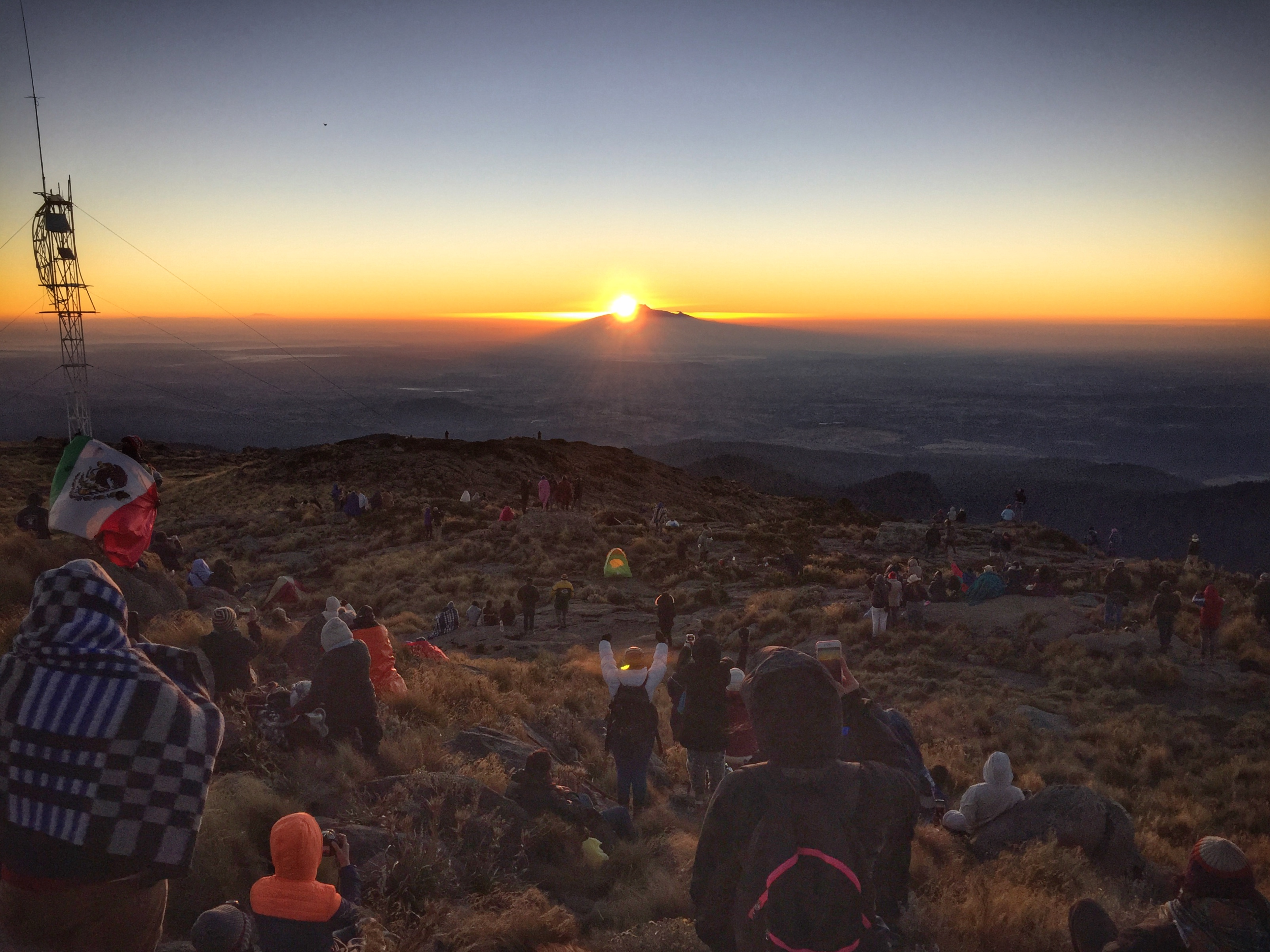 Amanecer en el que se aprecia una vez al año el fenómeno arqueológico/astrológico de la Montaña Fantasma en el Monte Tláloc. La montaña fantasma es un fenómeno óptico en el cual las siluetas de los volcanes Pico de Orizaba, La Malinche y Sierra negra se funden al amanecer creando la ilusión de que, en lugar de ser tres, es una sola montaña. Este fenómeno es observable una vez al año y solamente apreciable desde las ruinas del centro ceremonial prehispánico ubicado en la cima de monte Tláloc. Éste fenómeno era conocido por los Mexicas y era esperado con un solemne ritual.